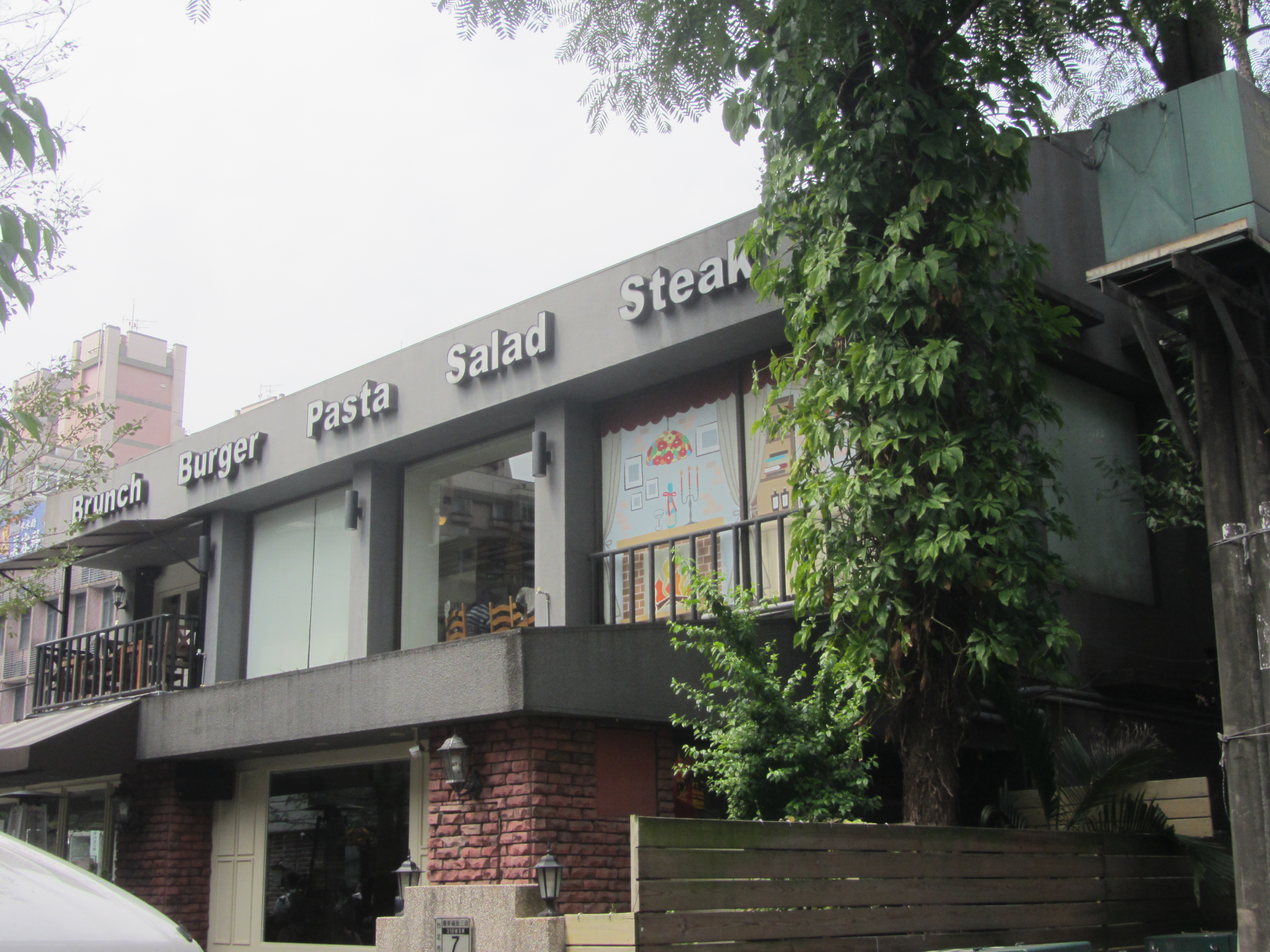 汀州路台鐵舊宿舍